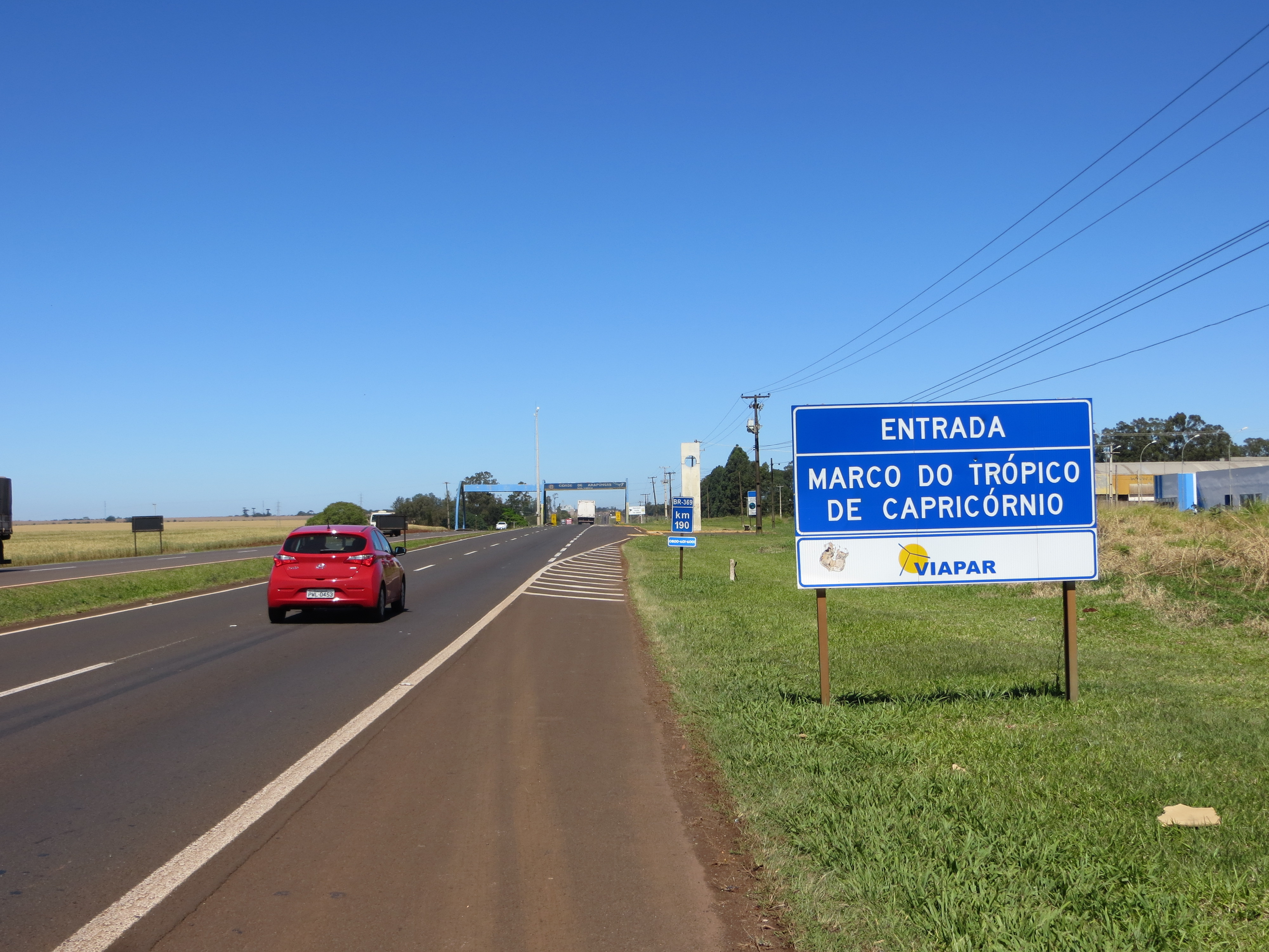 Marco do Trópico de Capricórnio, em Arapongas, Paraná, Região Sul do Brasil.